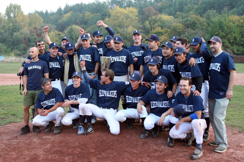 A 2006-os baseballbajnokság bajnokcsapata, a Szentendre Sleepwalkers (Szentendre, Izbég)